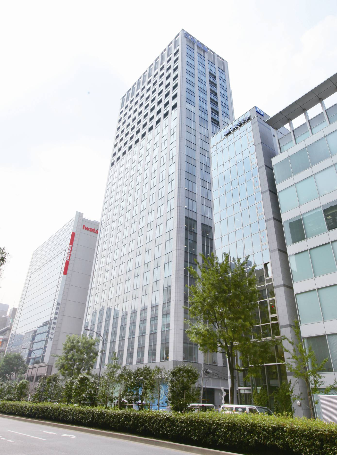 本社ビル外観